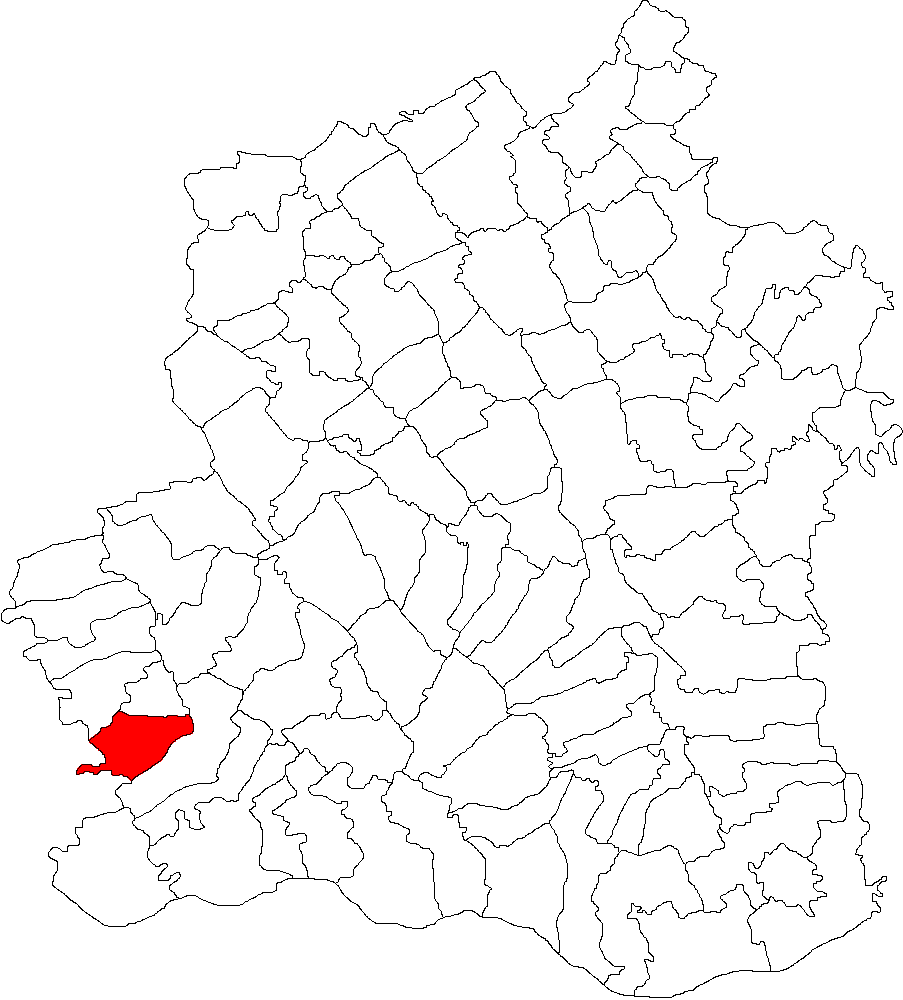 Categorie:Hărţi ale judeţului Teleorman